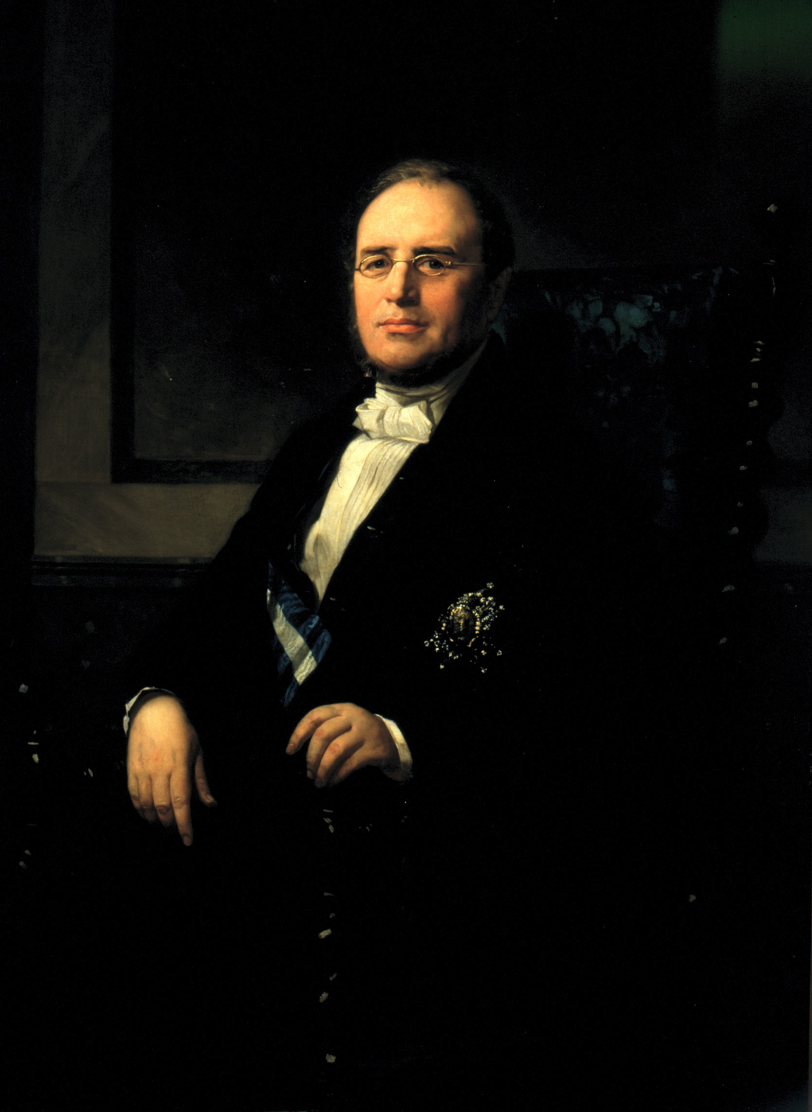 Retrato de Pedro José Pidal (1799-1865), que fue el primer marqués de Pidal y vizconde de Villaviciosa. También fue político, medievalista, historiador, crítico literario y diplomático, así como ministro de la Corona, senador, embajador en Roma, director de la Real Academia de la Historia y académico de la Real Academia Española, benefactor del Real Sitio de Covadonga y caballero de la Orden del Toisón de Oro. Fue el padre de Alejandro Pidal y Mon y abuelo de Pedro Pidal.